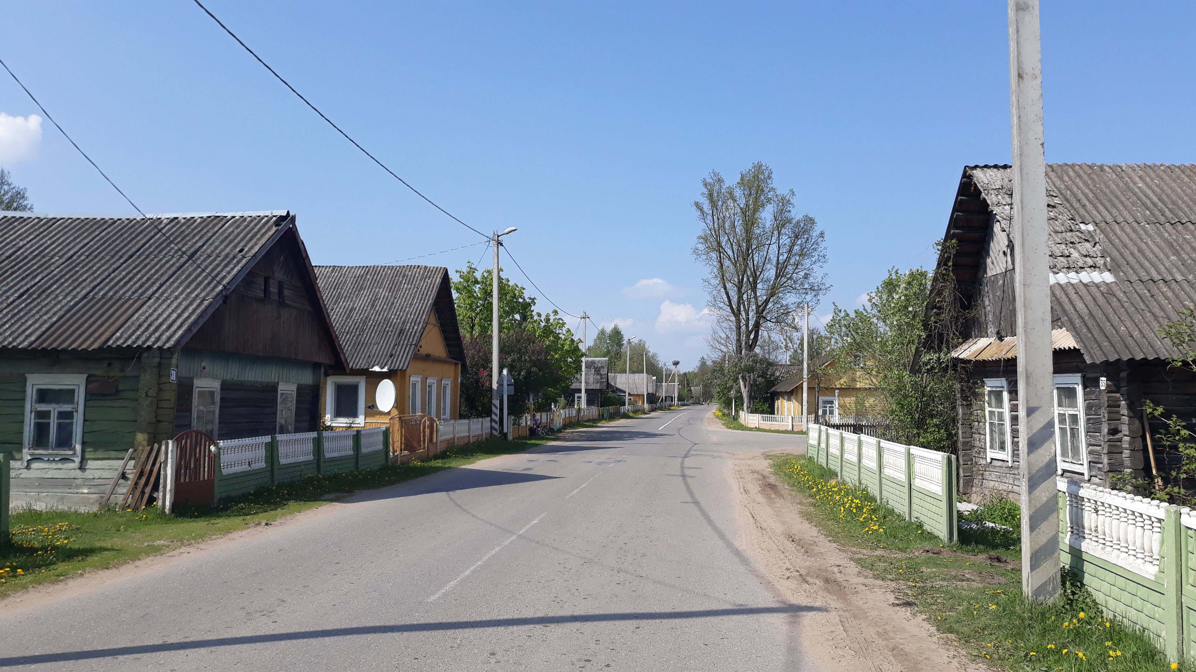 Краявід вёскі